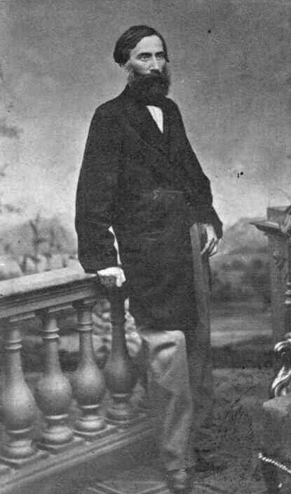 Димитър Мутев, директор на Болградската българска гимназия